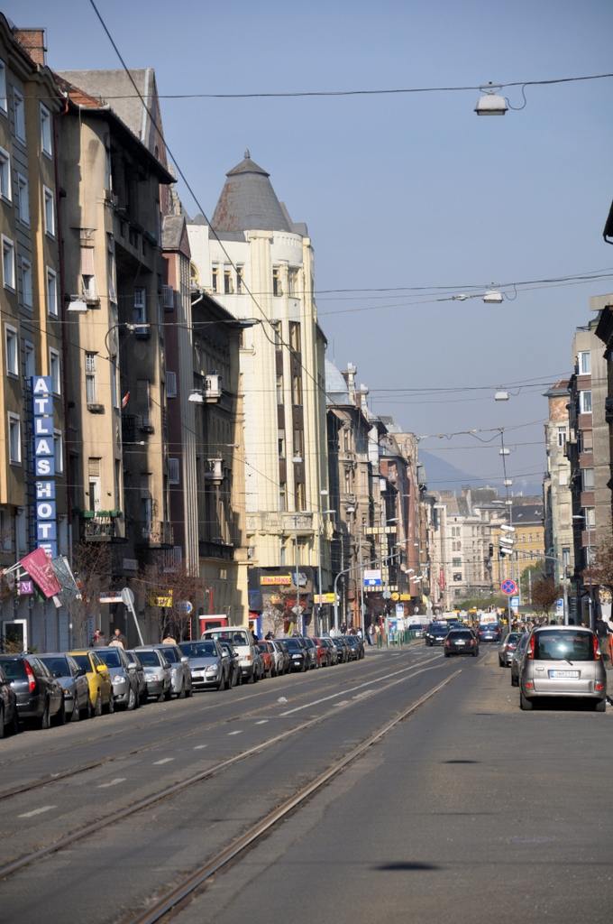 Népszínház Street, Budapest